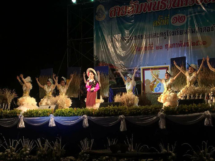 งานสายสัมพันธ์วันครอบครัว โรงเรียนสันป่าตองวิทยาคม